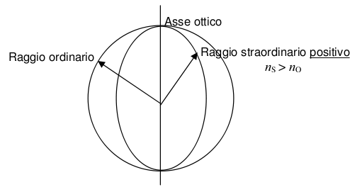 Propagazione dei fronti d'onda in un cristallo a birifrangenza positiva